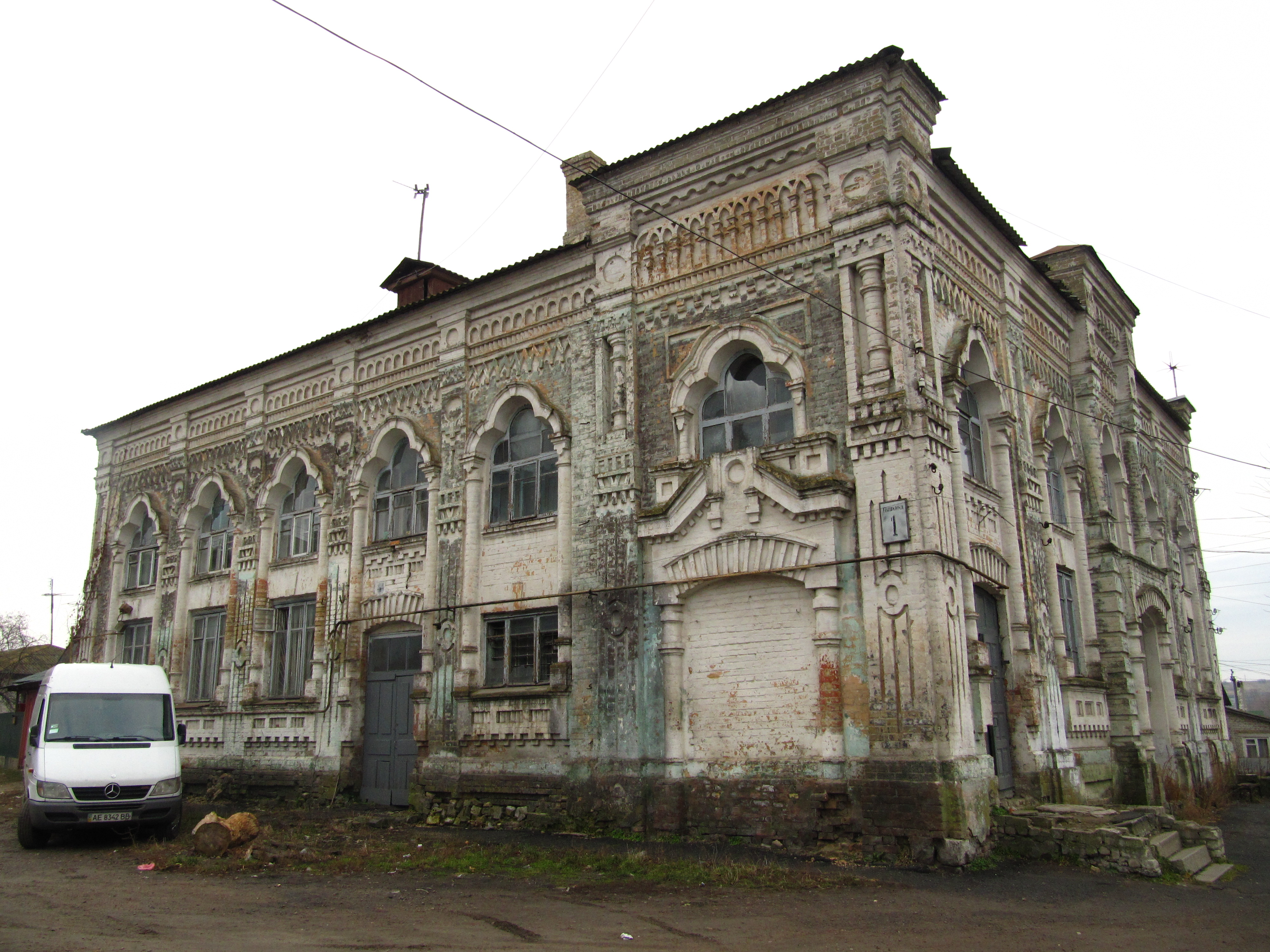 Колишня синагога (до 1940 р.), пізніше стара залізнична станція "Васильків ІІ"